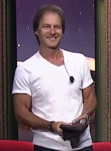 Pavol Habera v Show Jana Krause v roce 2016